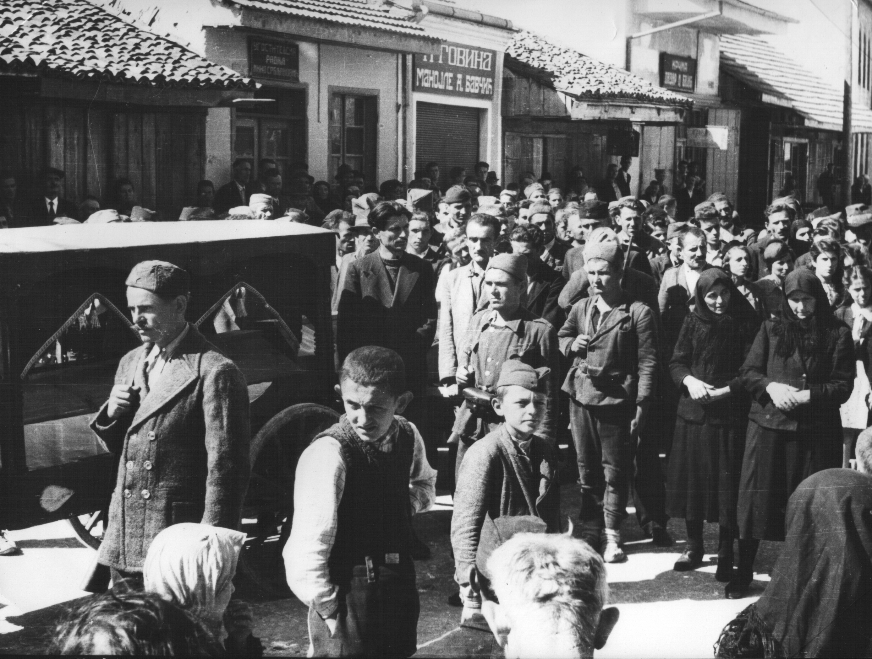 Srpskohrvatski / српскохрватски: Sahrana Boška Buhe u Pljevljima 1943.